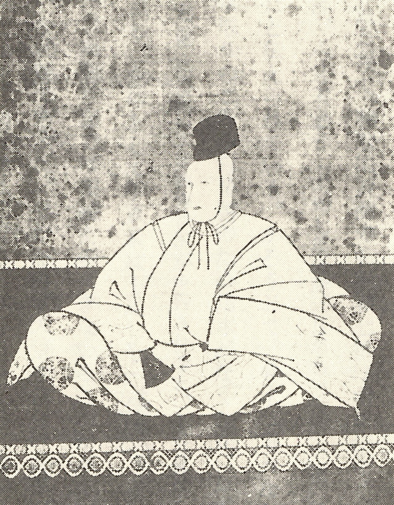 徳川治寶の肖像。